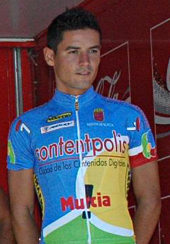 Alberto Rodríguez Oliver. Contentpolis-Murcia, Euskal Bizikleta 2008